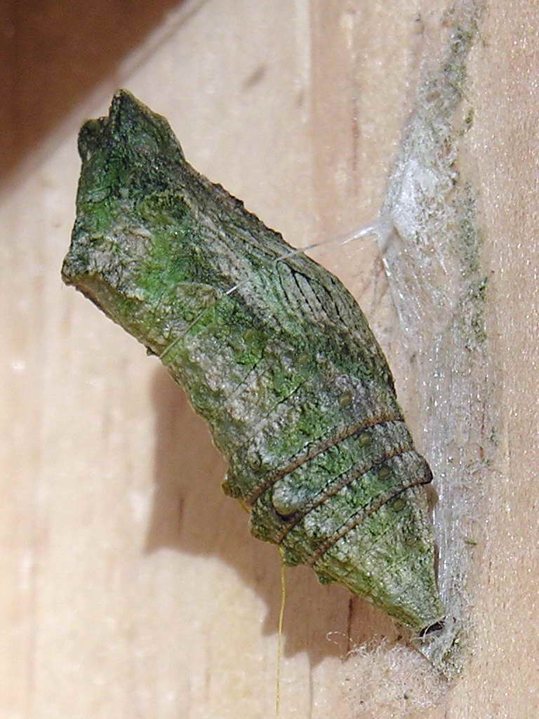 self made. Mandaio - Oza dos ríos - Galicia - Spain